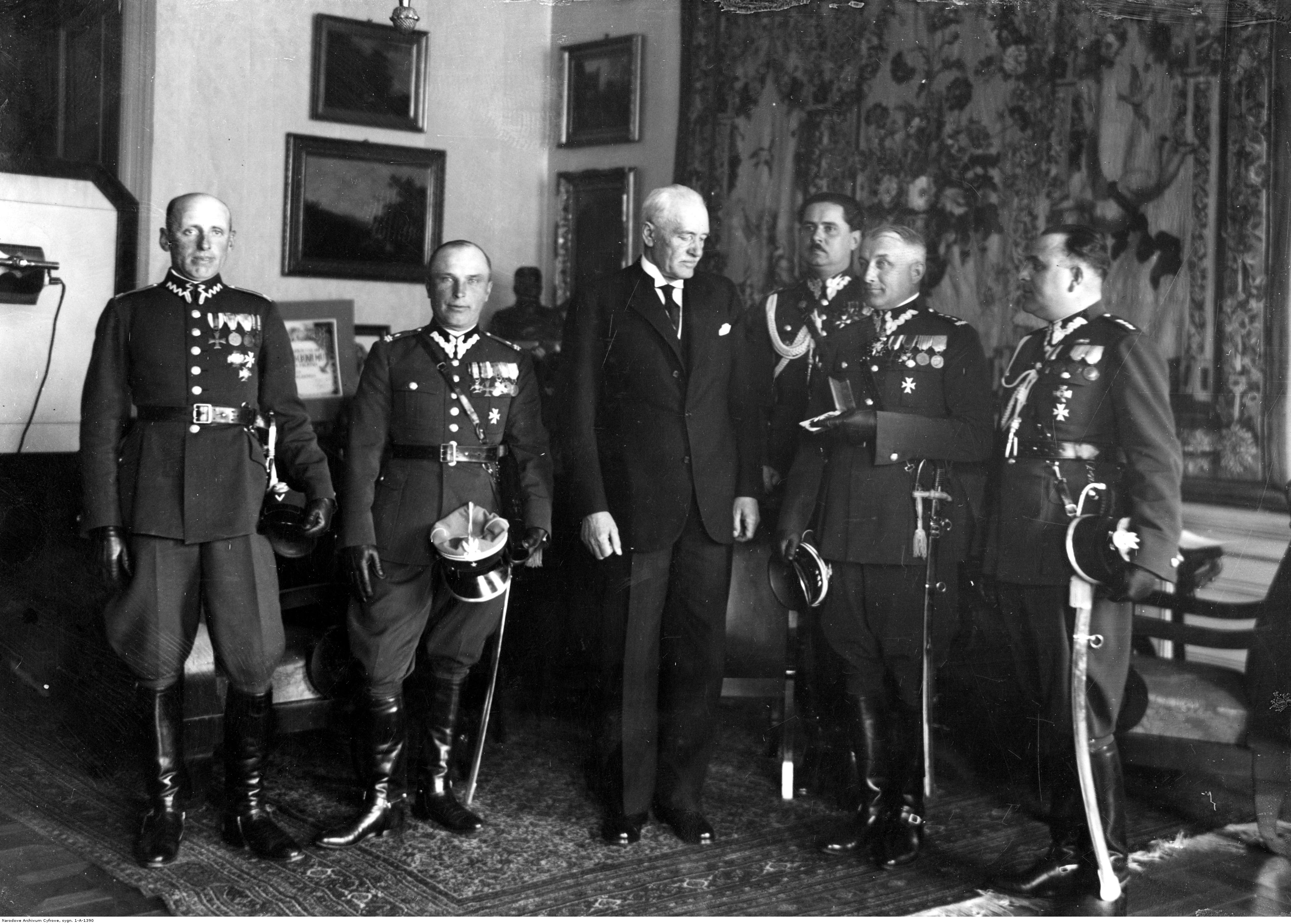 Delegacja 2 Pułku Artylerii Lekkiej na audiencji u prezydenta RP Ignacego Mościckiego - wręczenie prezydentowi RP odznaki honorowej pułku; 10 maj 1933 r. Widoczny m.in. płk Jan Bigo (drugi z prawej). Koncern Ilustrowany Kurier Codzienny - Archiwum Ilustracji. Sygnatura: 1-A-1390